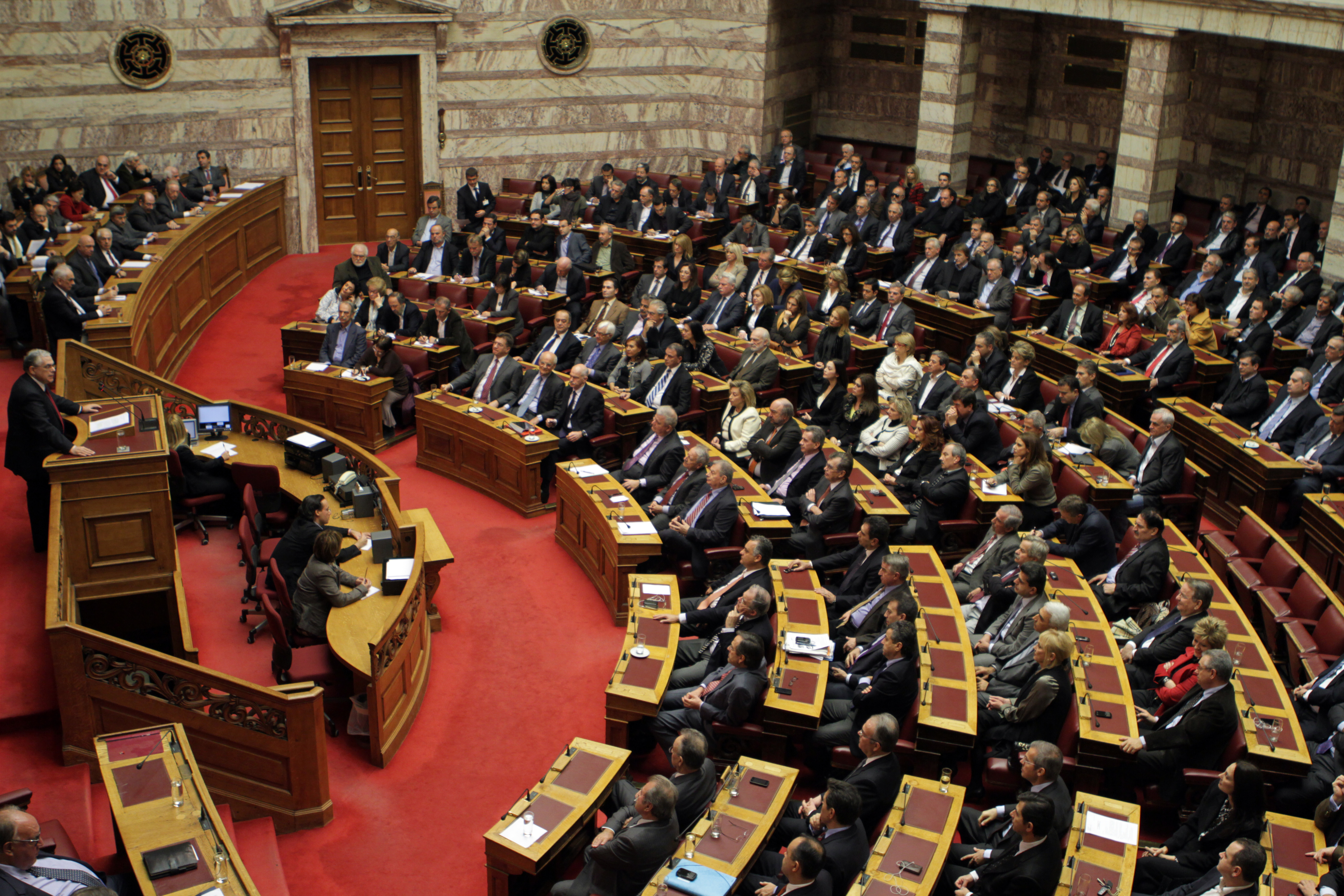 Προγραμματικές Δηλώσεις της Κυβέρνησης - Ομιλία του Πρωθυπουργού Αίθουσα Ολομέλειας, Κοινοβούλιο 14 Νοεμβρίου, 2011